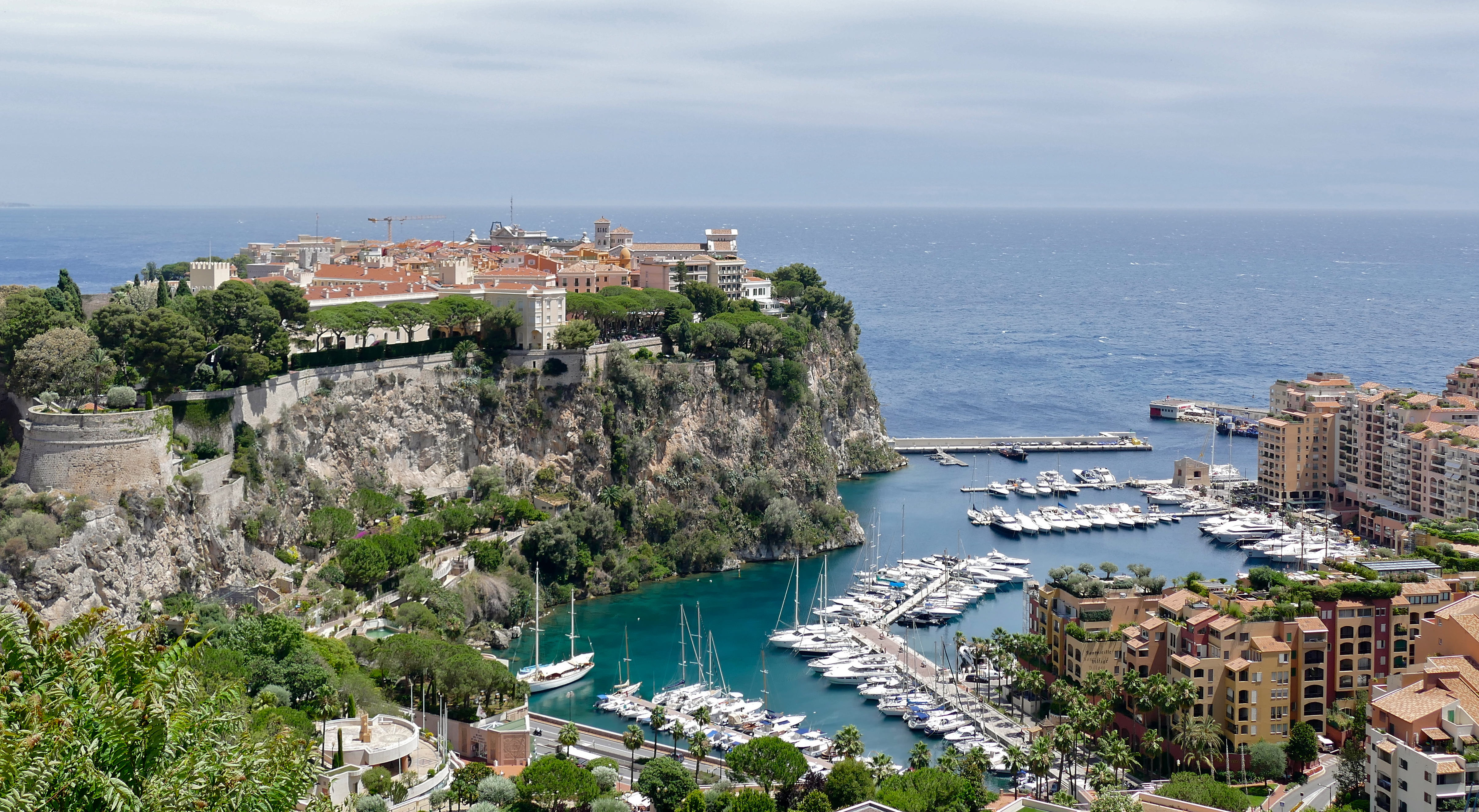 Jardin Exotique, MONACO